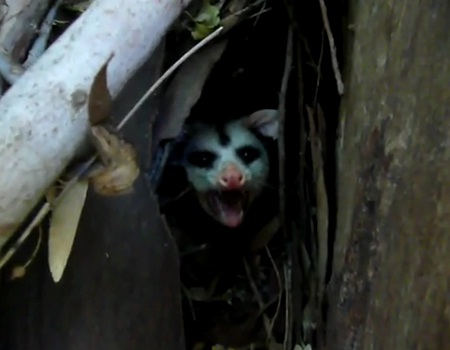 La zarigüeya escondiéndose en el árbol